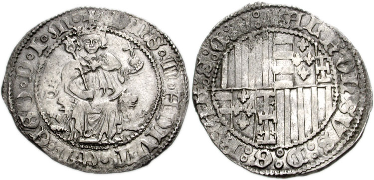 Carlí d'Alfons el Magnànim, 1435/42-1458.